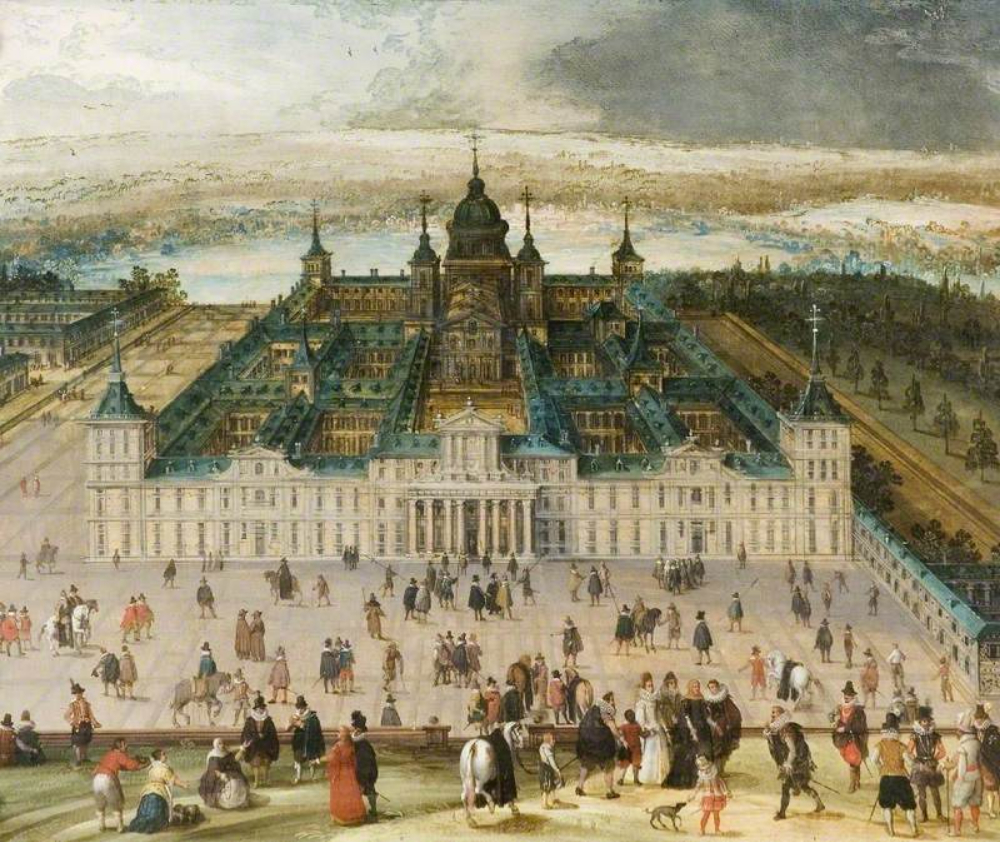 El Escorial, óleo sobre tabla, Tyne & Wear Museums